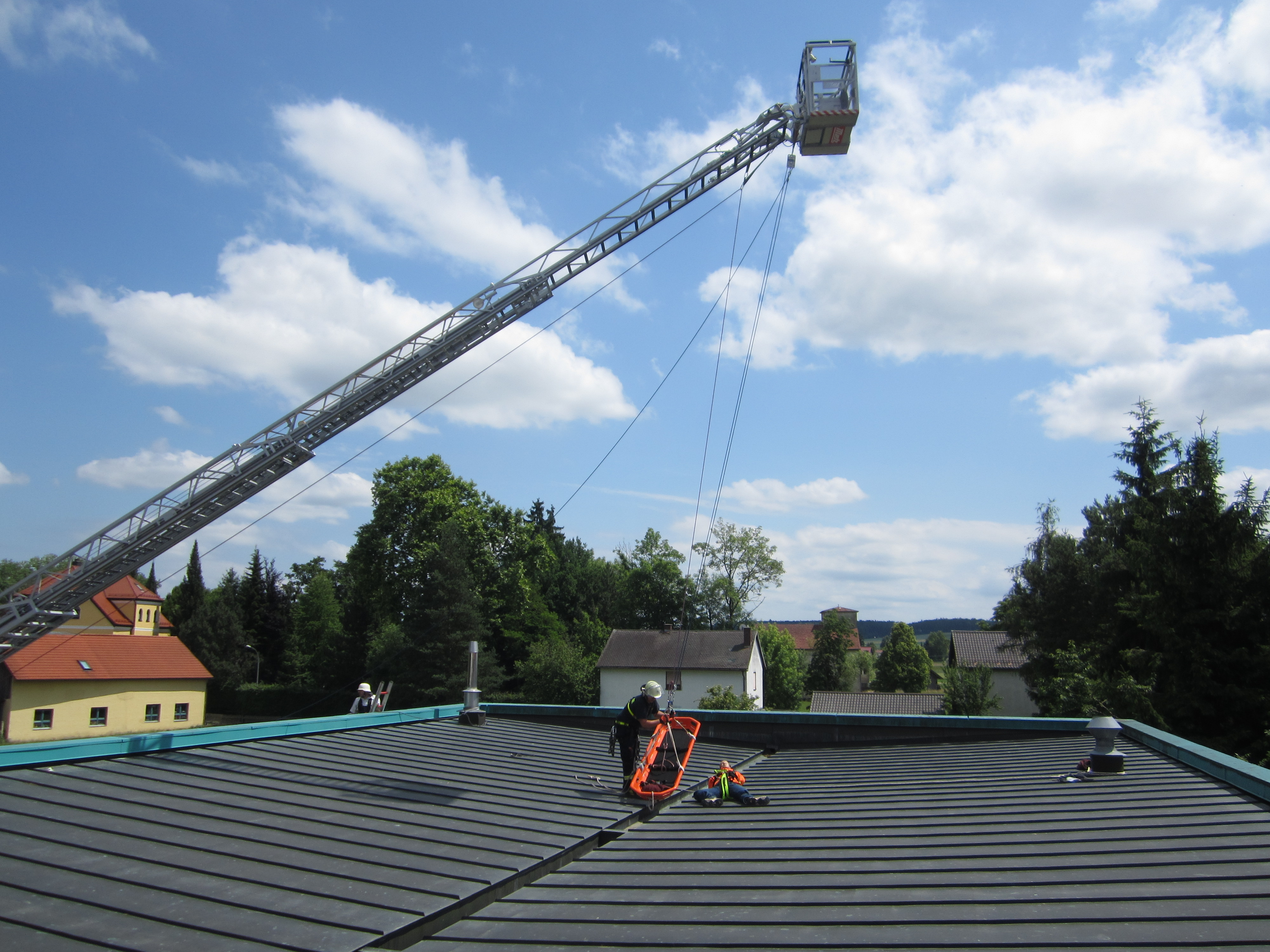 Eine mögliche Variante für Einfachen Rettungen aus Höhen und Tiefen